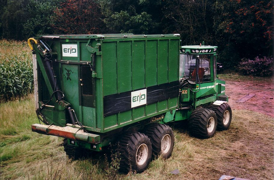 Skogsjan-Forwarder 1088 LT 8 WD mit Hackschnitzelcontainer statt des Standard-Rungenaufbaus (wechselbar über Hakenliftsystem) als kombiniertes Rücke-Container-Fahrzeug, eingesetzt als „Shuttle“ bei der Arbeit mit einem Hackschnitzelharvester.